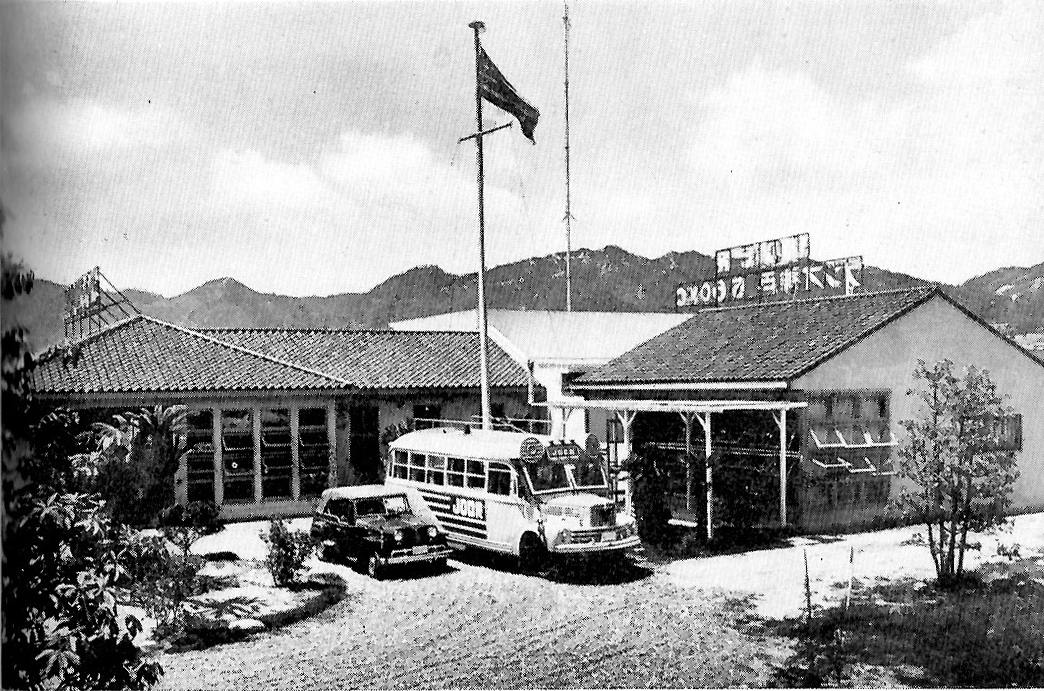 JOCR神戸放送（のちラジオ関西）の初代局舎。